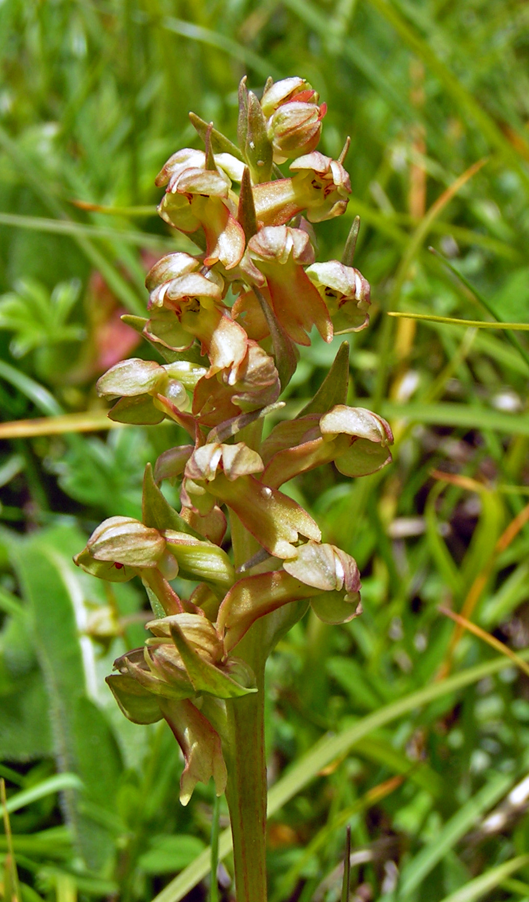 Coeloglossum viride Source:ex-Commons; vum Commons User Pethan; verschafft (Blatz eraus) vum Cornischong